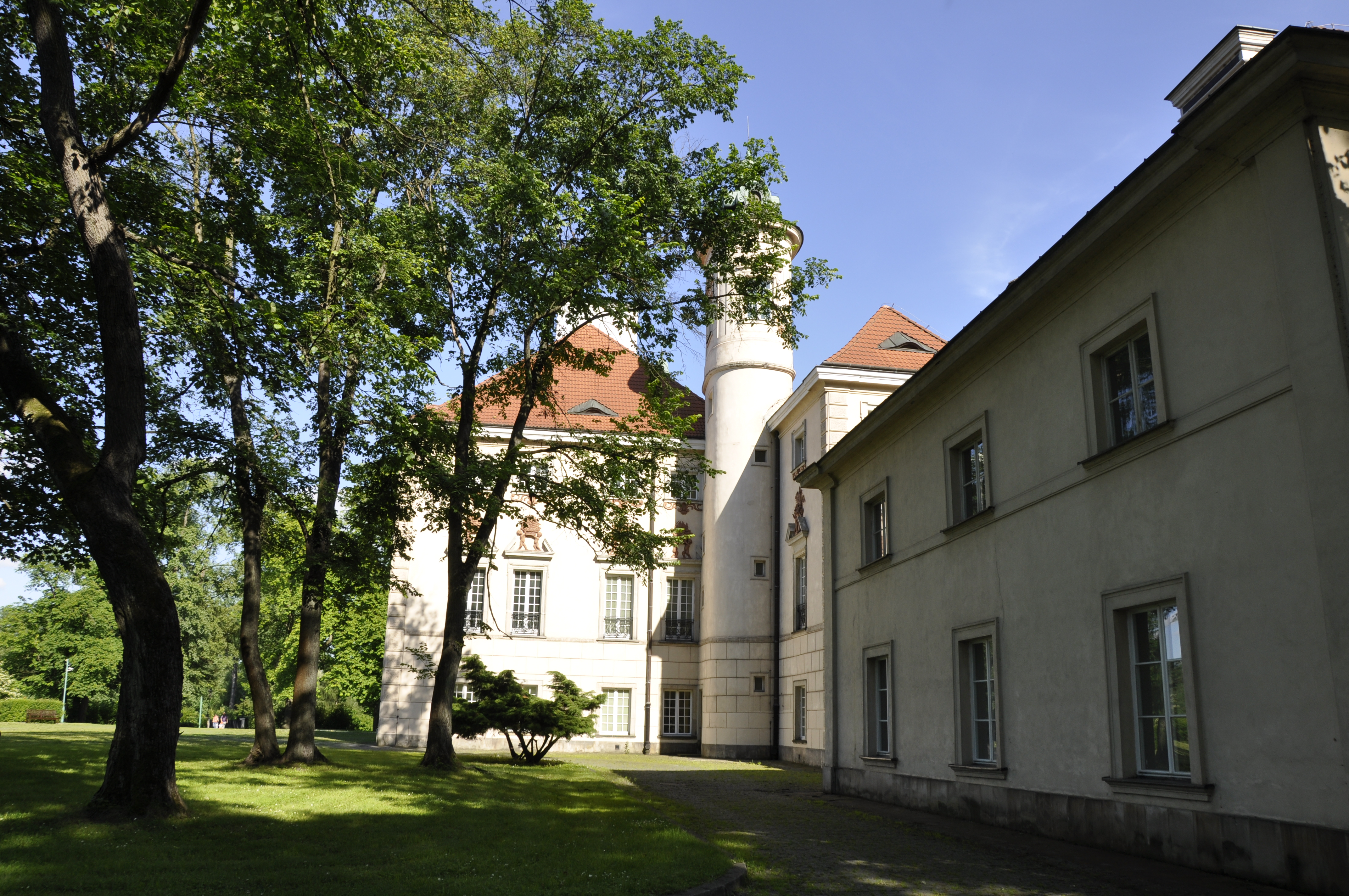 Orwock Wielki